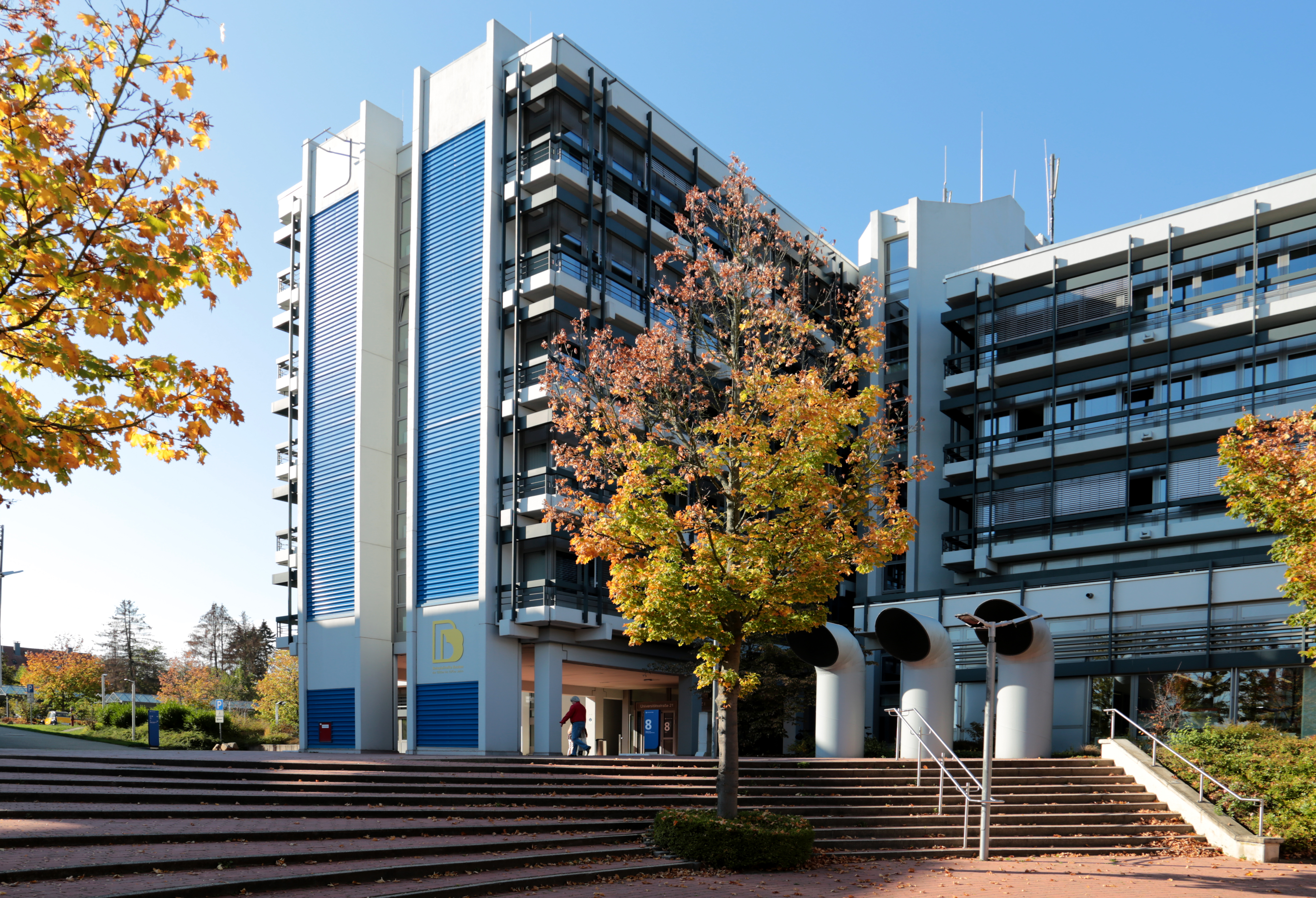 Allgemeines Verfügungszentrum (AVZ) der FernUniversität Hagen